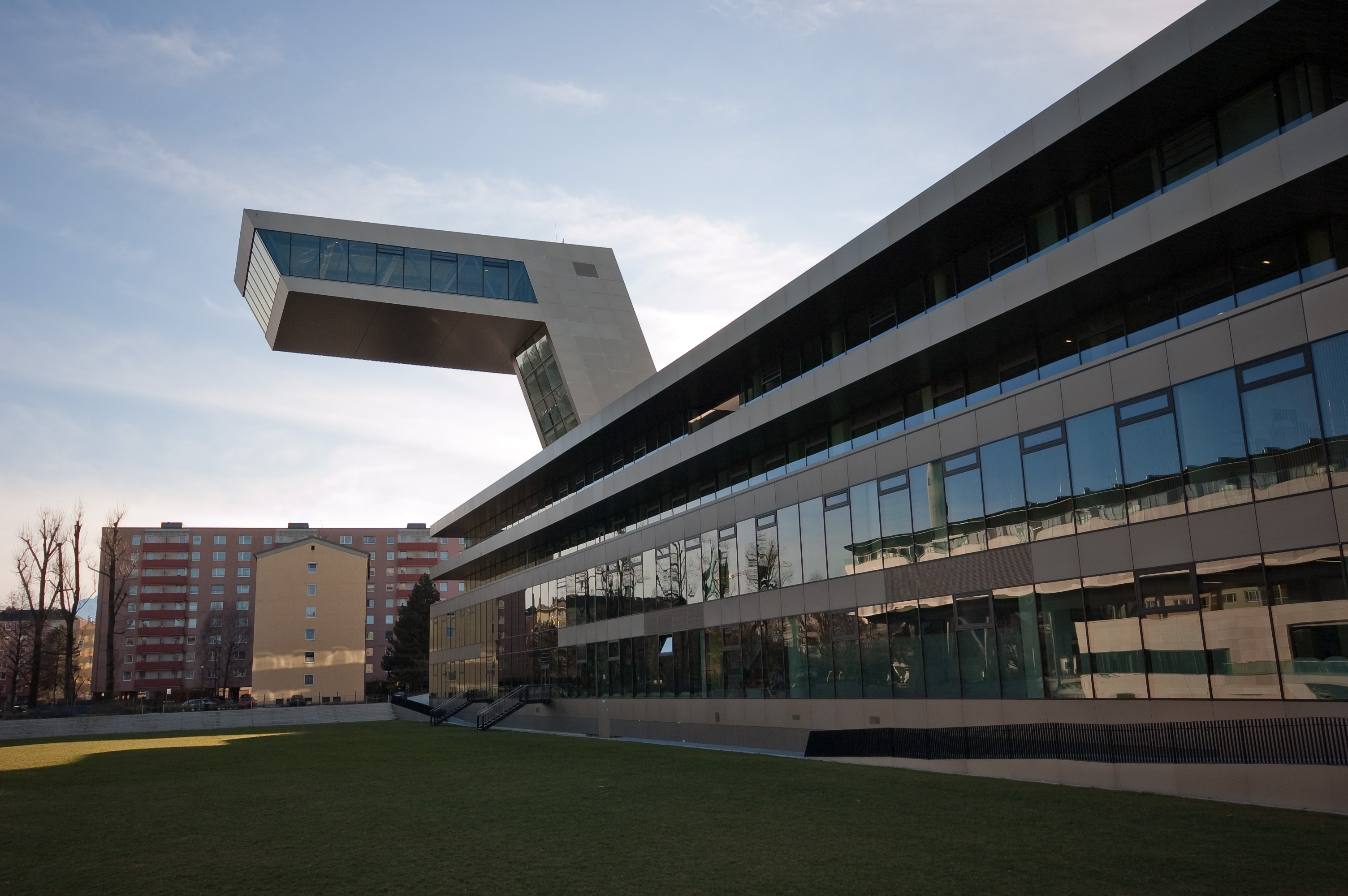 Ansicht der Stadt:Bibliothek Salzburg von der Parkseite